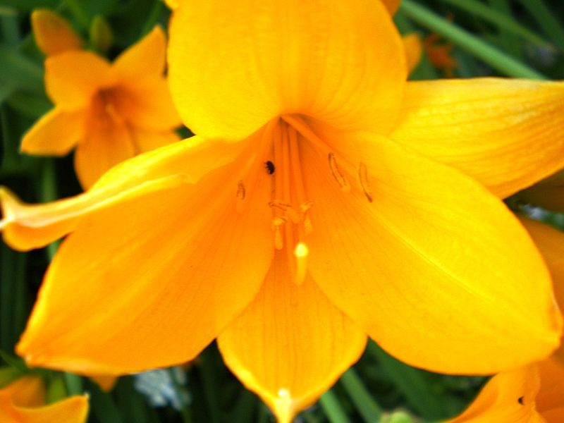 Geltonoji viendienė